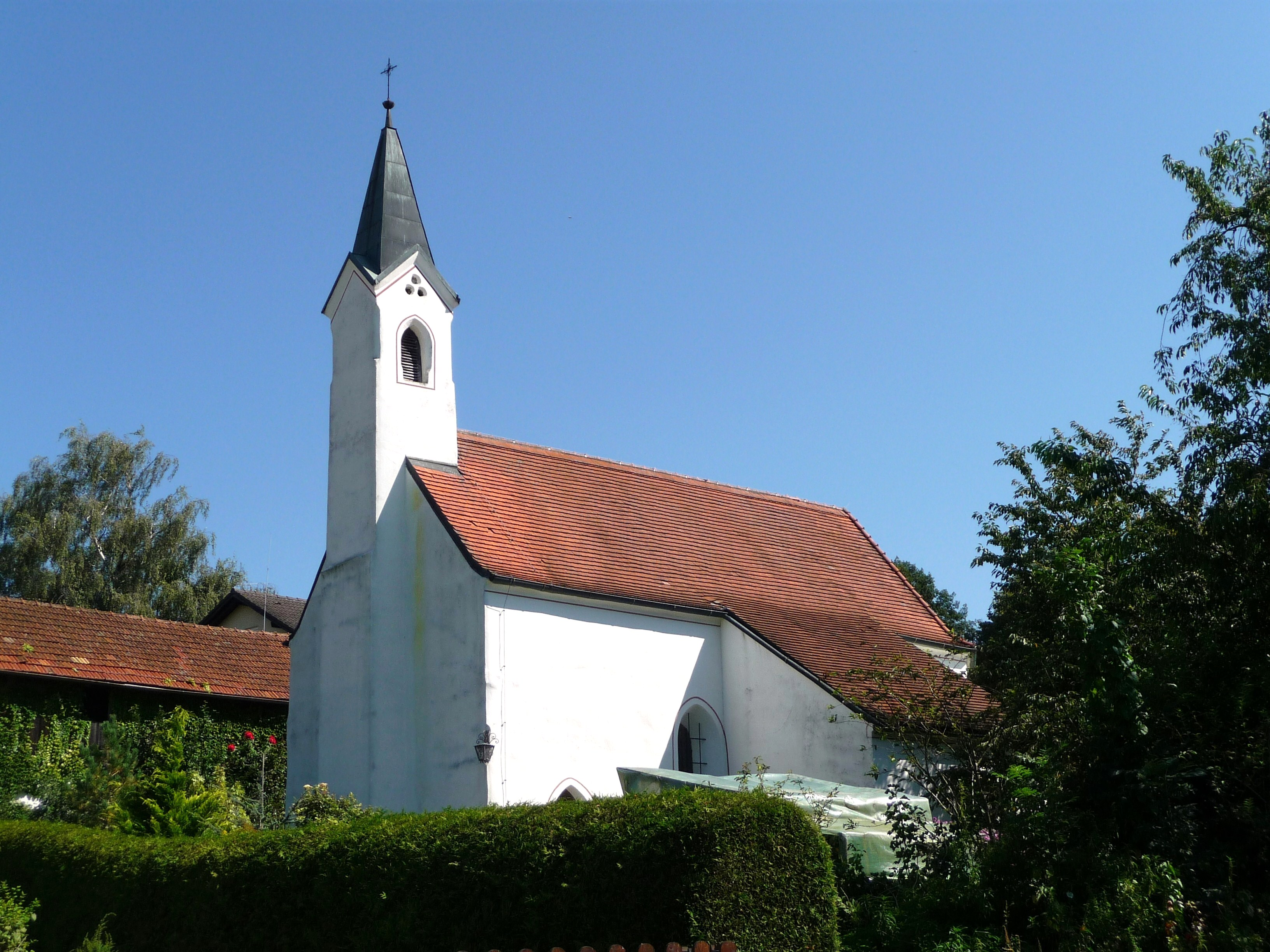 Die Nebenkirche St. Ulrich in Lengham, einem Ortsteil von Bad Birnbach